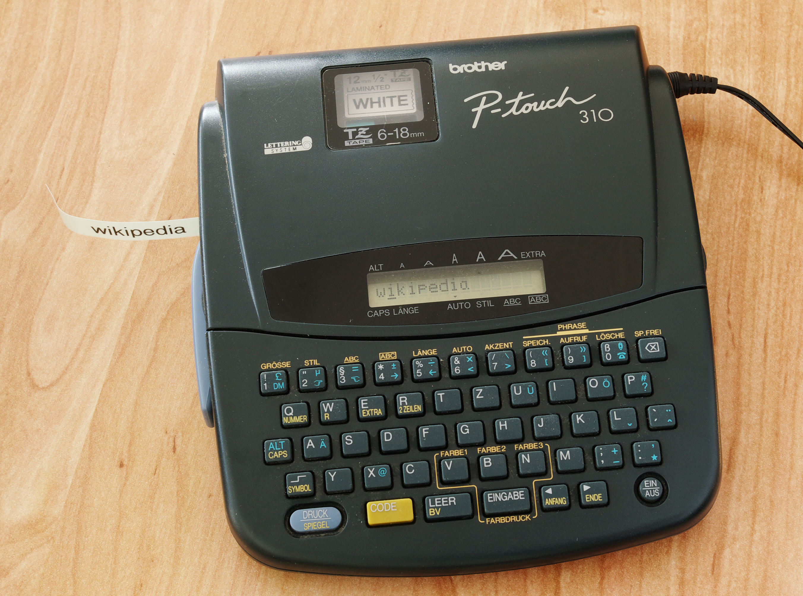 Beschriftungsgerät Brother P-touch 310 mit 15 Zeichen LCD-Display und Schriftbandbreiten von 6-18mm, Netz-oder Batteriebetrieb